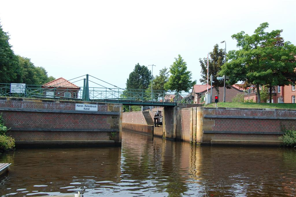 De ingang van het Haren-Rutenbrockkanal aan de Eems in Haren.